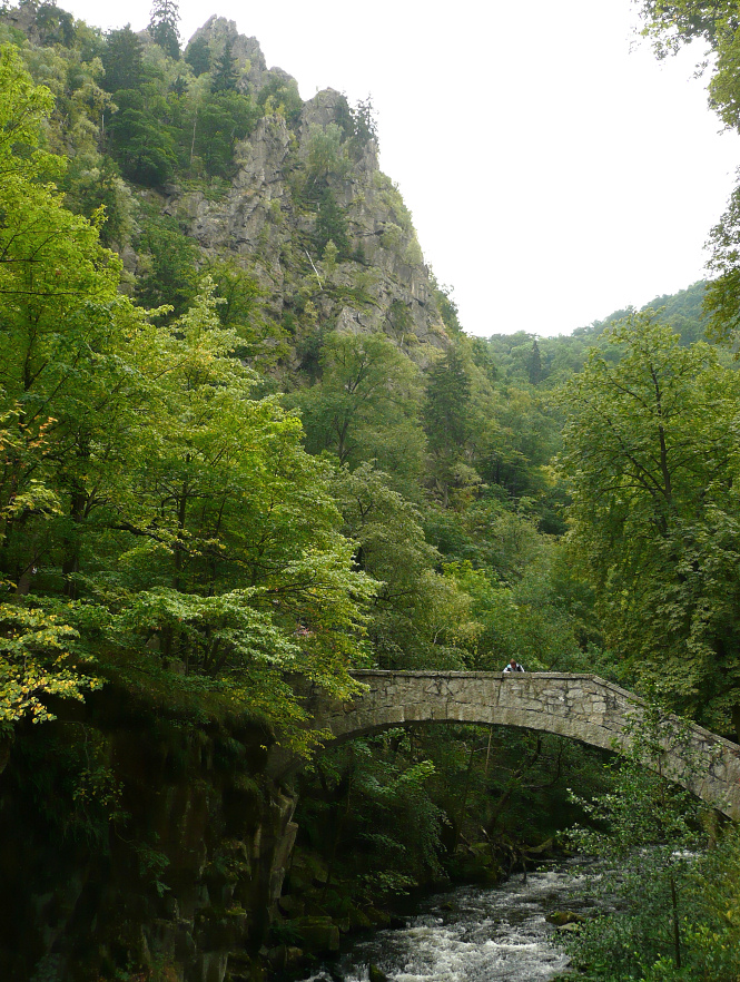 Jungfernbrücke im Bodetal